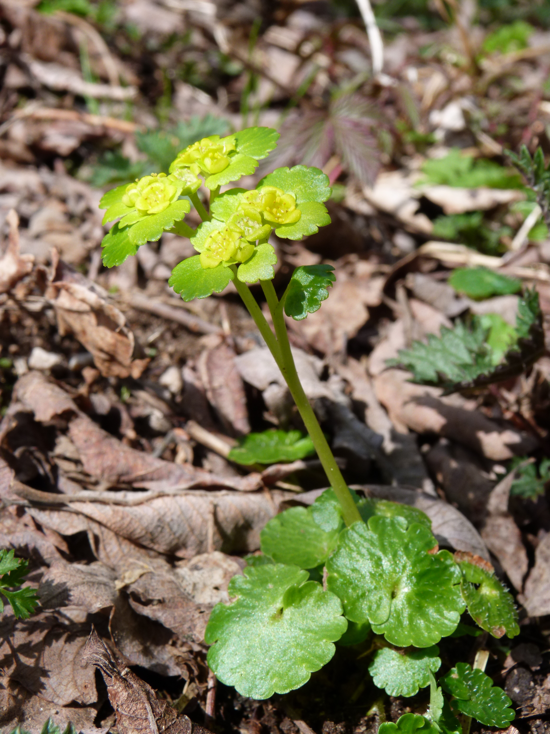 Chrysosplenium alternifolium à Retournemer, Vosges.